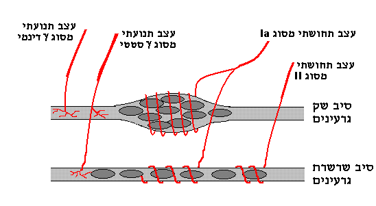 muscle spindle